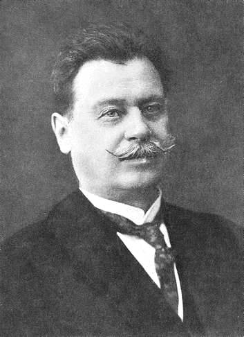 Русский философ-неокантианец Александр Иванович Введенский (1856-1925)